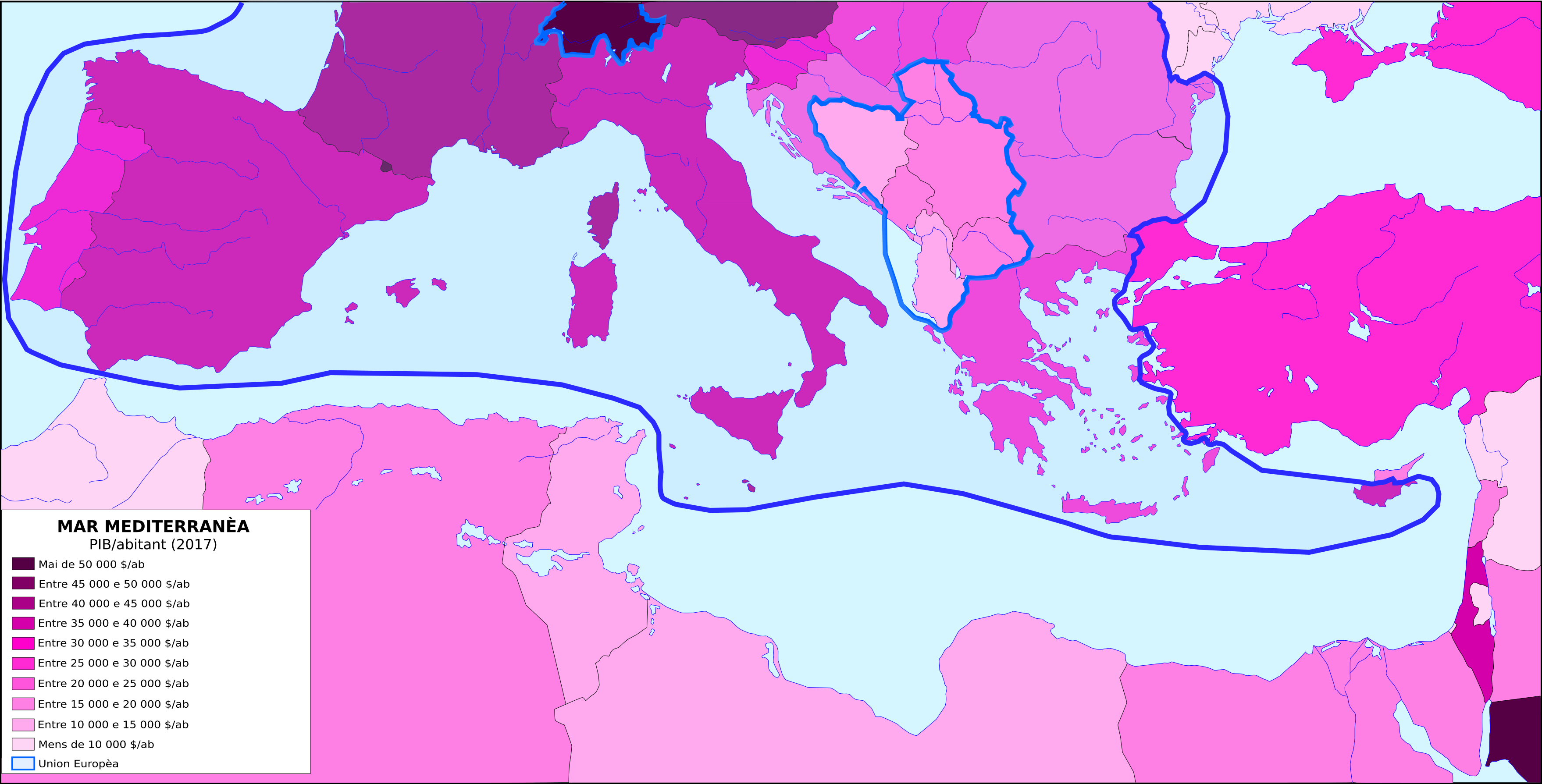 PIB/abitant a l'entorn dau Bacin Mediterranèu.